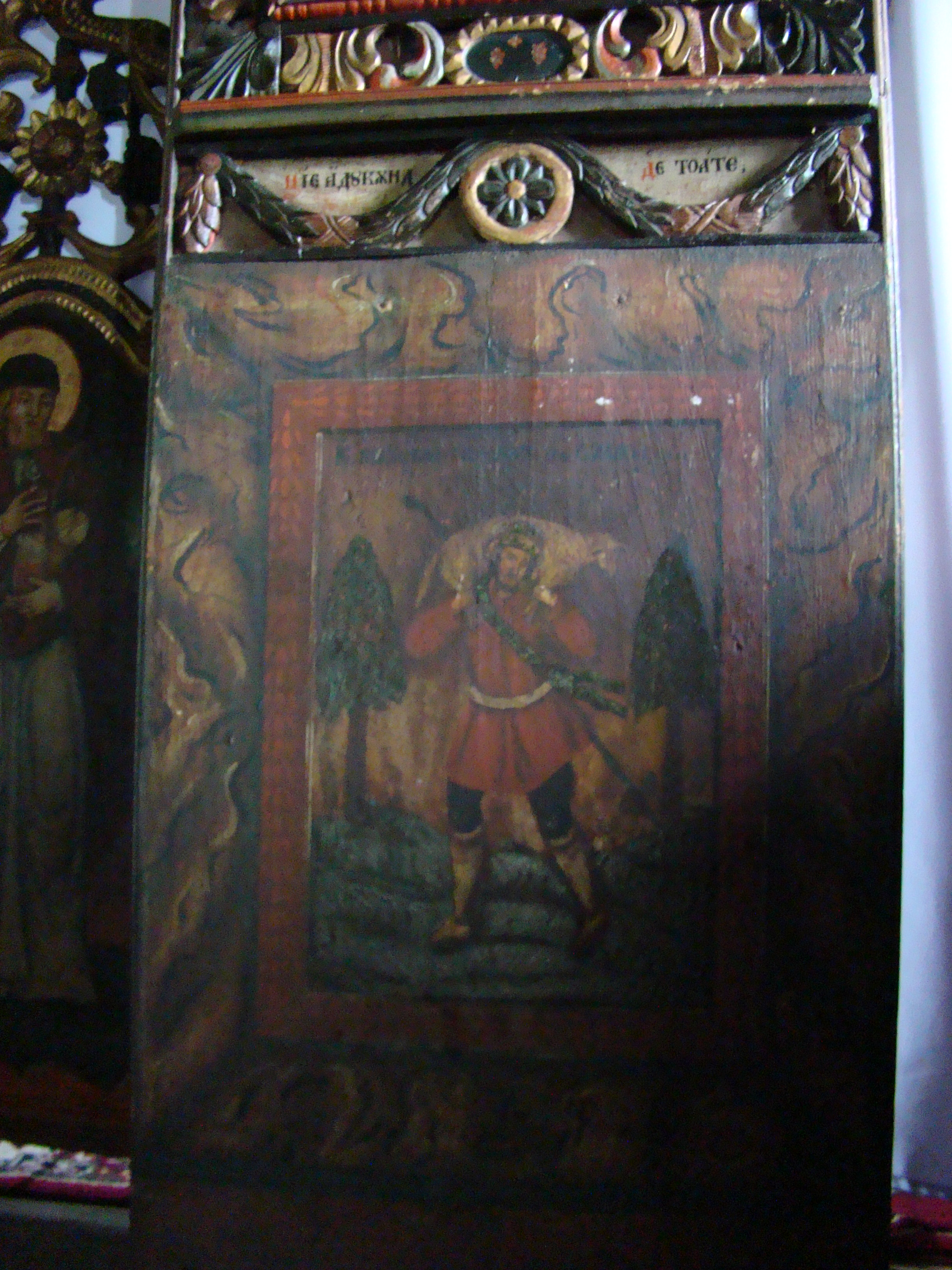 Biserica „Sf. Arhangheli Mihail și Gavriil” din Răstoci”, județul Sălaj